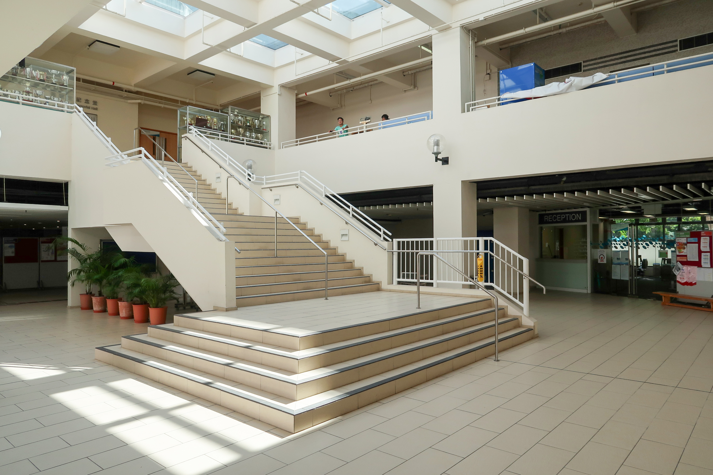 IVE Chai Wan Campus